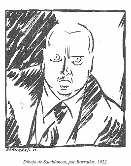 Caricatura de Ángel Samblancat.